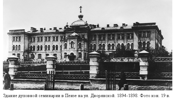 Старое здание Пензенской духовной семинарии